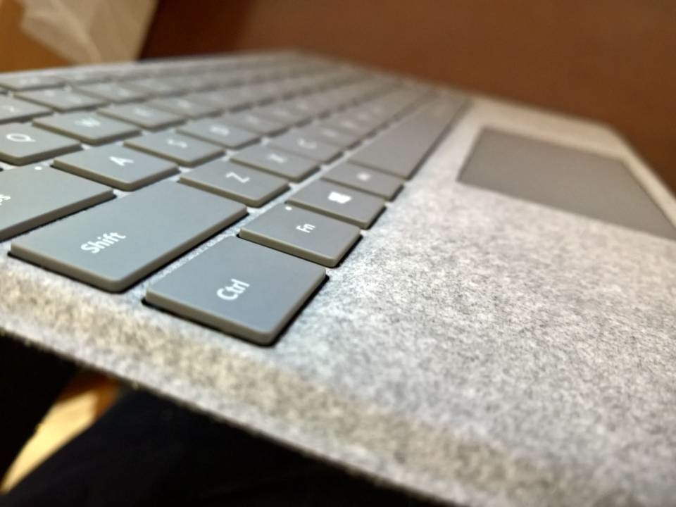 此为适配所有 Surface 机型的键盘盖，但比 Surface Pro 和 Surface Pro 2 的屏幕面积大，故更适合 Surface Pro 3 及更高版本使用。